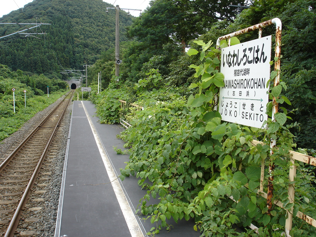 猪苗代湖畔駅